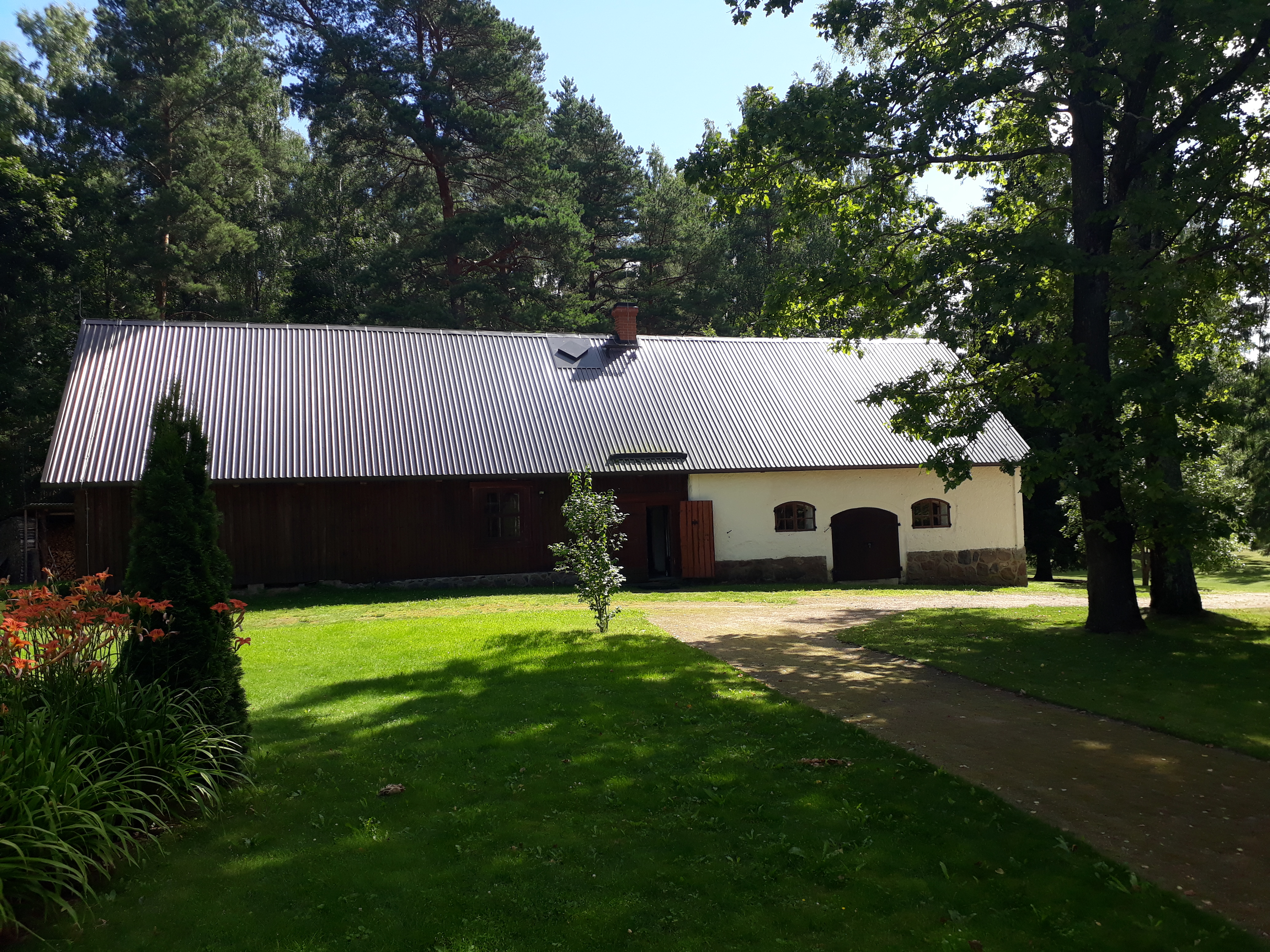 Saatse Seto Muuseumi hooned, Samarina